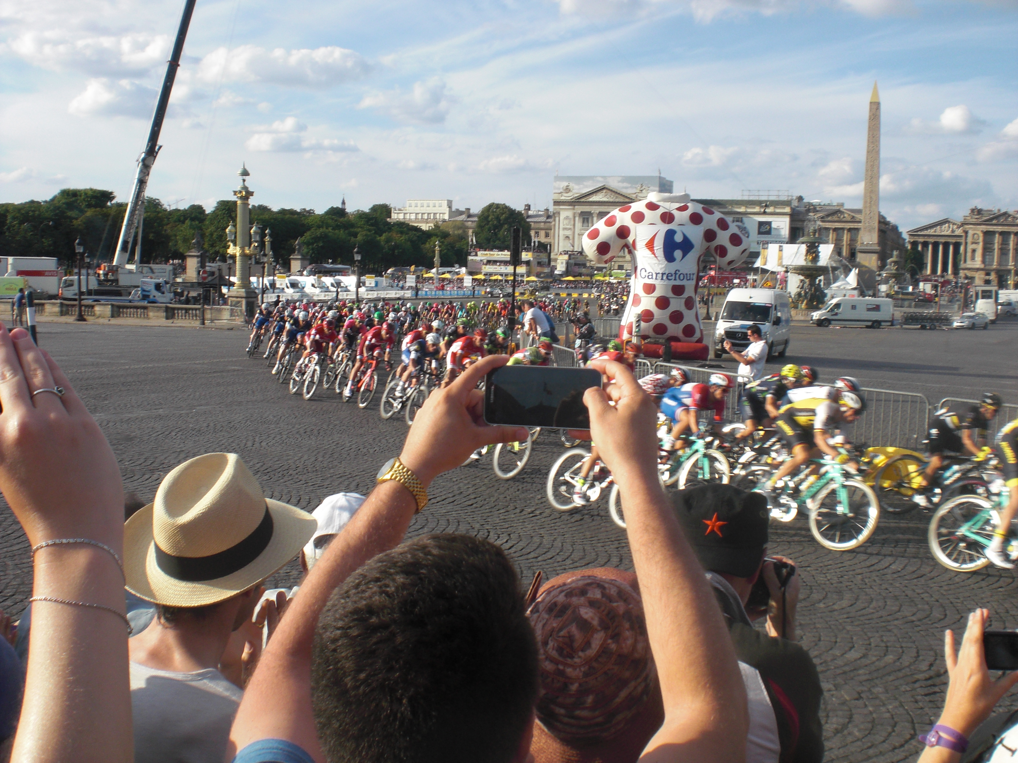 Fina etapo